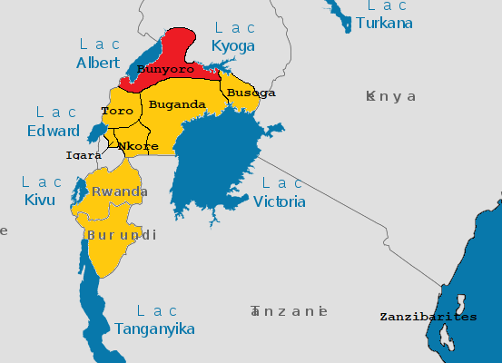 Carte du Burundi au milieu du XIXe siècle